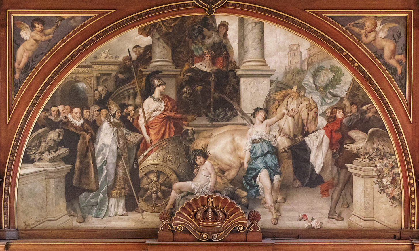 Gemälde „Gründung der Universität Heidelberg“ von Ferdinand Keller (im Innenraum der Aula der Alten Universität in Heidelberg) Erläuterung der Figuren, v.l.n.r.: (1) Thomas Erast (1524 – 1583), Medizinprofessor und Leibarzt des Kurfürsten Ottheinrich (2) Zacharias Ursinus (1534 – 1583), Theologe und Hauptverfasser des „Heidelberger Katechismus“ (3) Friedrich Christoph Schlosser (1776 – 1861), dem Liberalismus nahestehender Historiker (4) Anton Friedrich Justus Thibaut (1772 – 1840), Rechtswissenschaftler und Prorektor der Universität (5) Hugo Donellus (1527 – 1591), französischer Jurist und Professor an der Universität (6) Rudolf Agricola (1444 – 1485), humanistischer Schriftsteller und Gelehrter (7) Samuel von Pufendorf (1632 – 1694), Philologe und Rechtswissenschaftler und Wegbereiter der Aufklärung (8) Maximilian Joseph von Chelius (1794 – 1876), Medizinprofessor und Leiter der Chirurgischen Universitätsklinik (9) Leopold Gmelin (1788 – 1853), Naturwissenschaftler und Herausgeber eines bedeutenden Handbuchs der theoretischen Chemie (10) Sebastian Münster (1488 – 1552), Professor an der Artisten-Fakultät und bedeutender Kosmograph (11) Johann von Dalberg (1455 – 1503), Kanzler der Universität von 1480 bis 1482 (12) Marsilius von Inghen (um 1340 – 1396), Rektor der Universität Paris und 1386 Gründungsrektor der Universität Heidelberg (13) Philipp Melanchthon (1497 – 1560), der bekannte Reformator hat in Heidelberg studiert und wirkte 1557 an der Neufassung der Universitäts-Statuten mit (14) Pallas Athene, Schutzgöttin der Weisheit und der Künste (15) Ruprecht I. (1309 – 1390), Kurfürst und Gründer der Universität Heidelberg (16) Siegesgöttin Nike